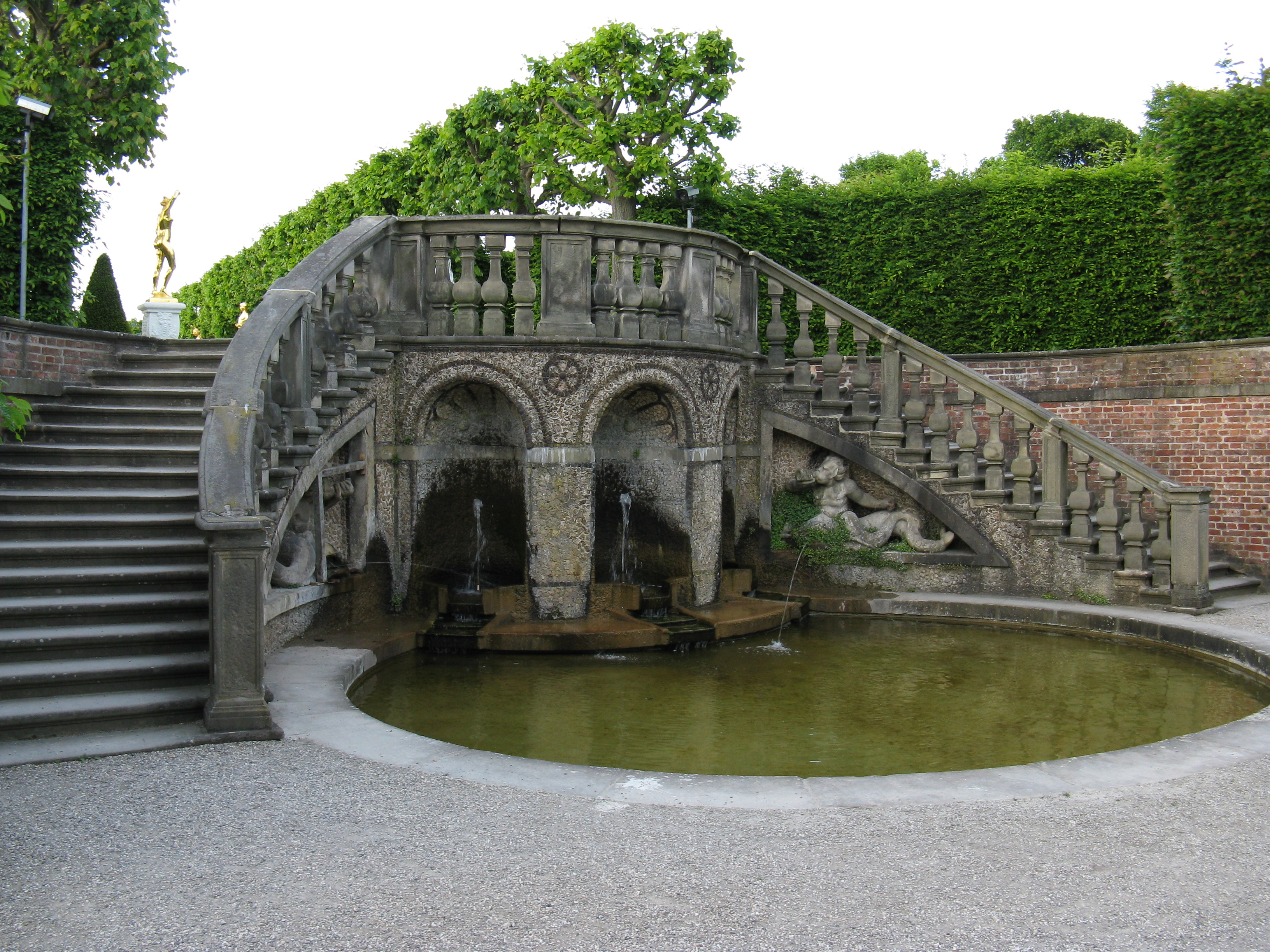 Großer Garten in Hannover-Herrenhausen: Treppe zum Theater